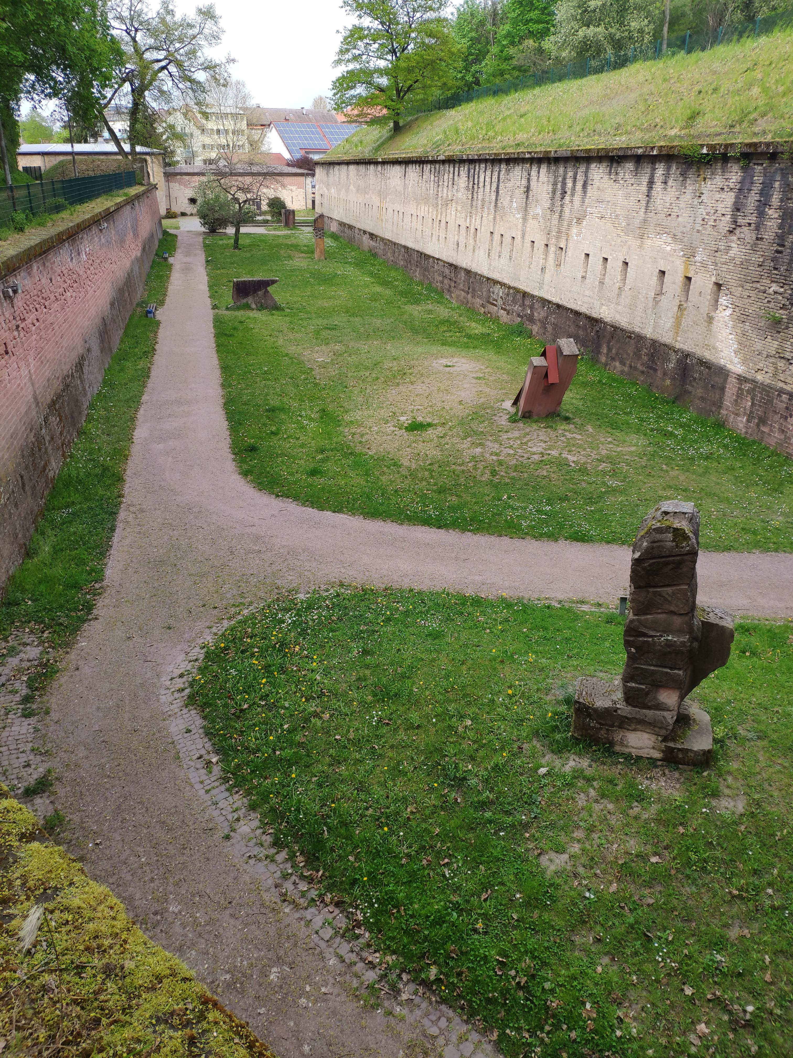 Skulpturenpark Germersheim Überblick Werke 4-9